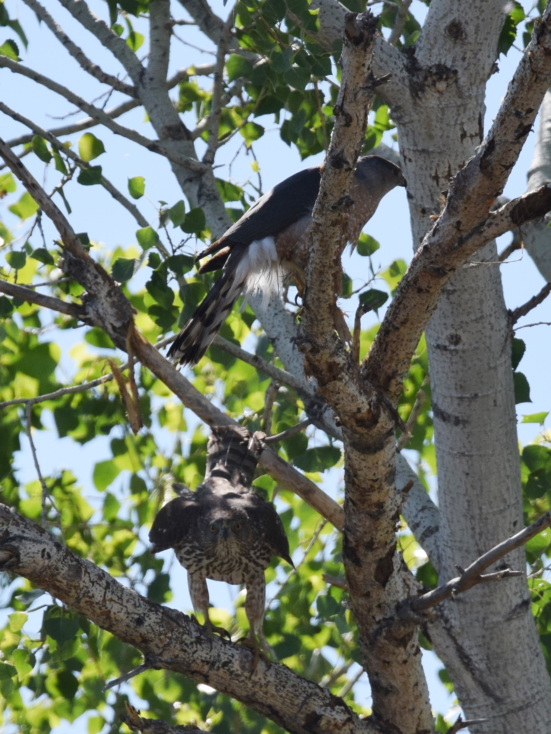 Sweetwater Wetlands Park 3/30/17